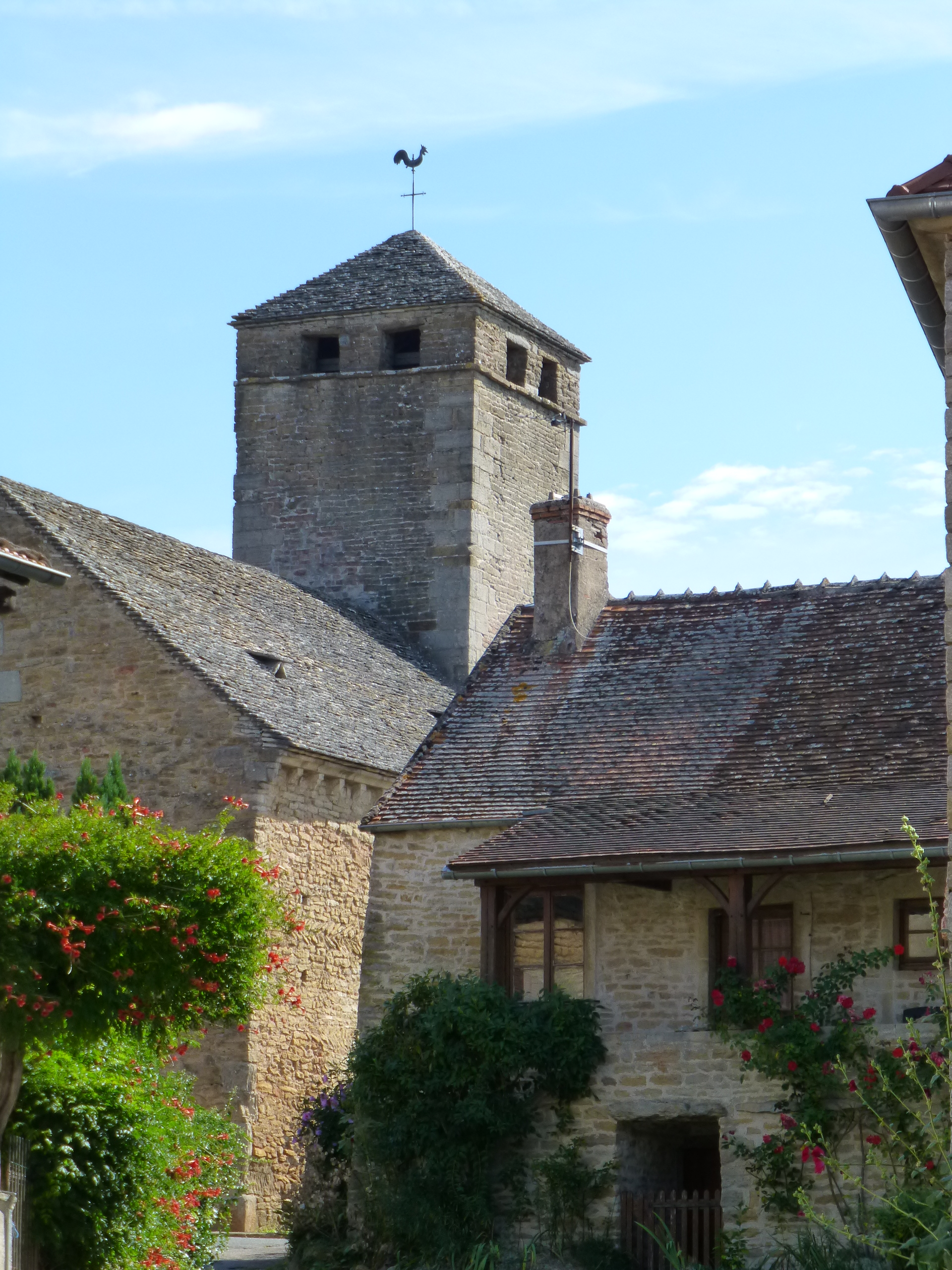 Saint-Clément-sur-Guye : Le Village. Les murs de la nef de l'église, dont l'origine remonte au Xe siècle, sont en partie appareillés en arête-de-poisson